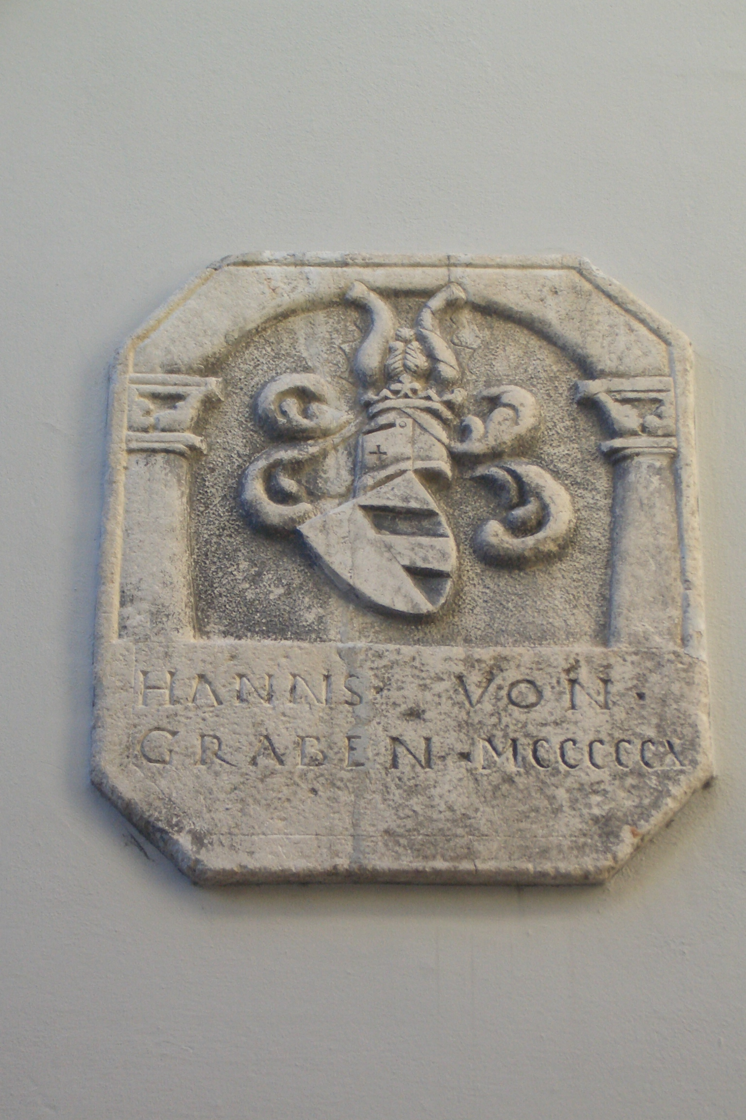 Het wapen van Hanns von Graben